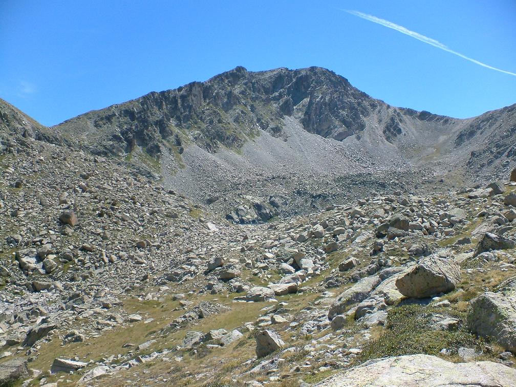 Pic de Mariolo vist des de la Vall de Morrano; La Torre de Cabdella, Pallars Jussà, Catalunya